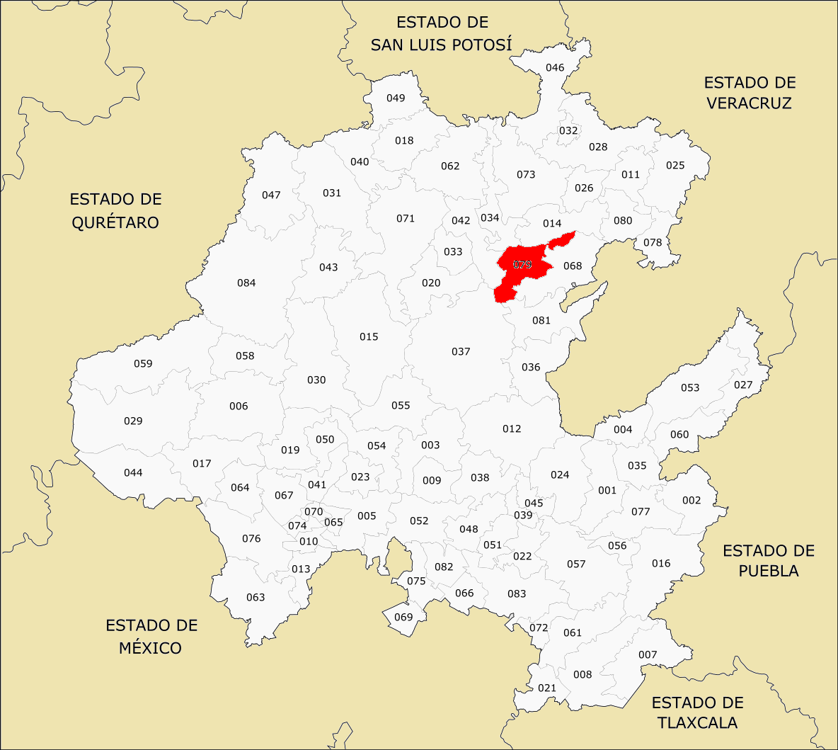 Municipios de Hidalgo